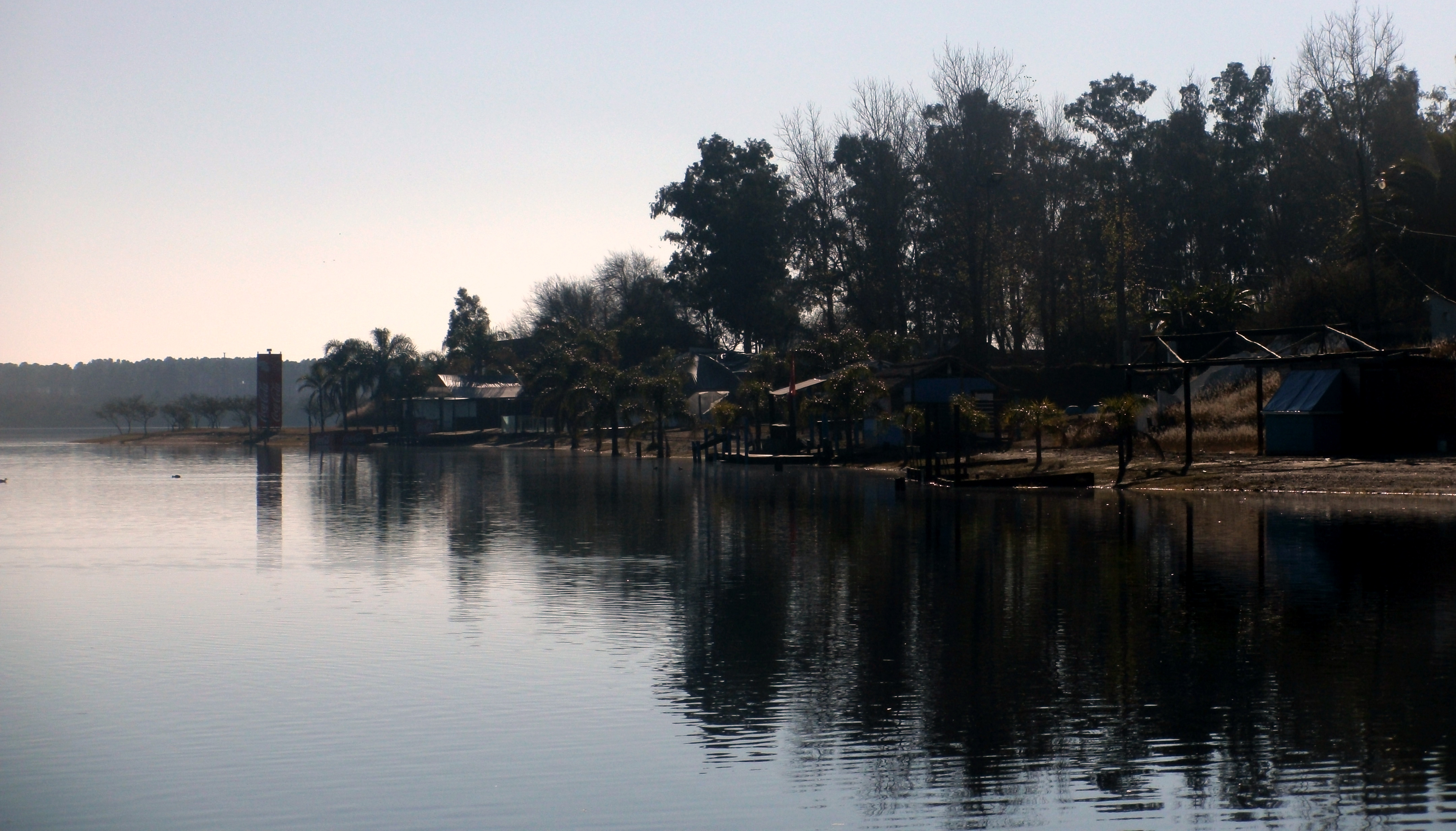 PARQUE RECREATIVO COSNTRUIDO EN LA COSTA DEL DIQUE PIEDRAS MORAS